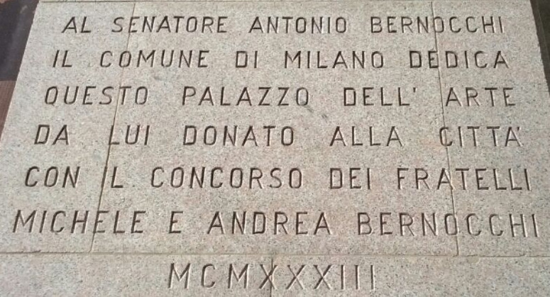 lapide posta sulla colonna sinistra dell'entrata in Triennale a Milano in ricordo di Antonio Bernocchi